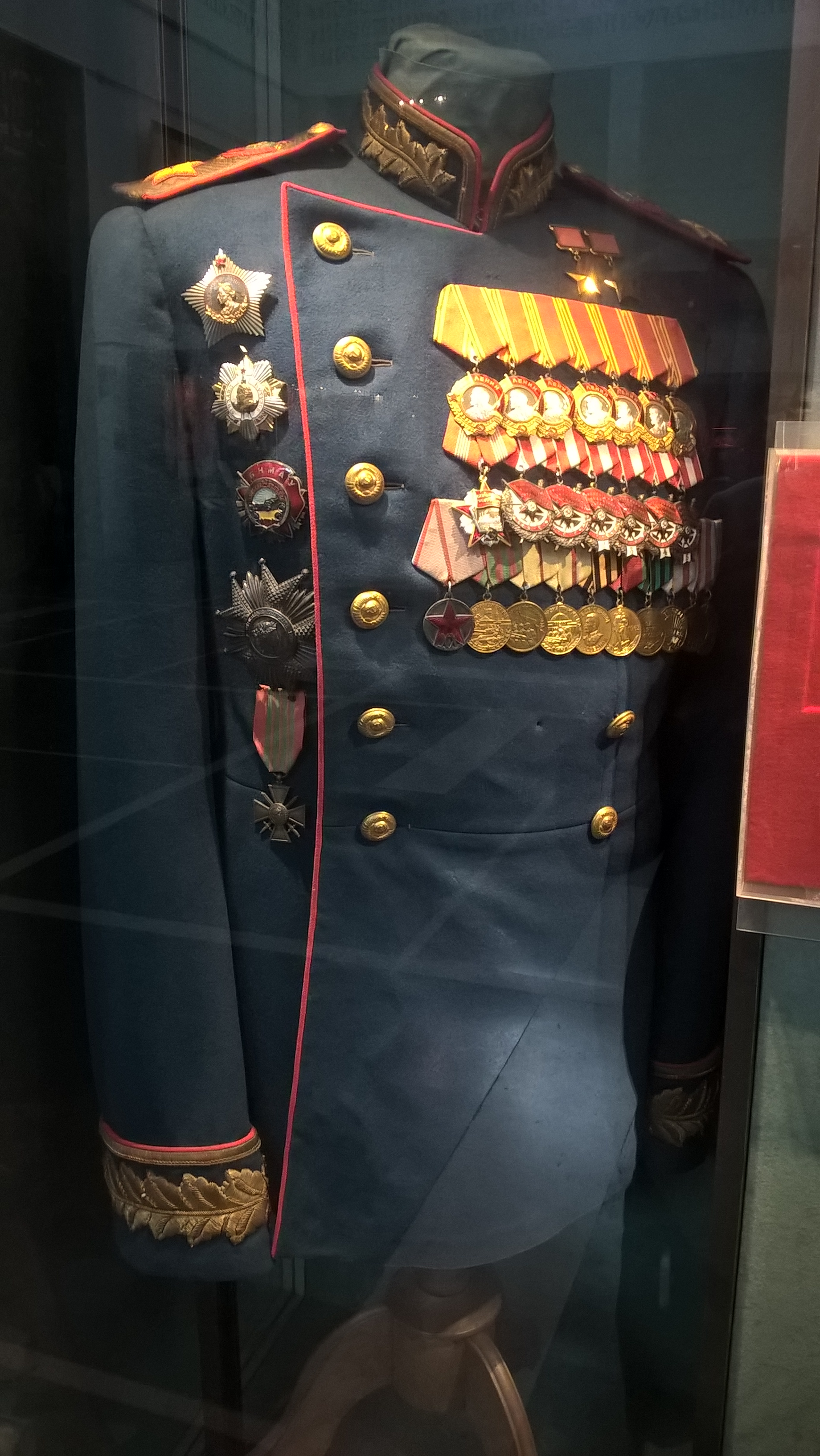 Китель Рокоссовского К.К. в Центральном Музее Вооруженных Сил